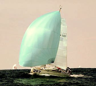 Minitransat 2007 - au large de La Rochelle (France)